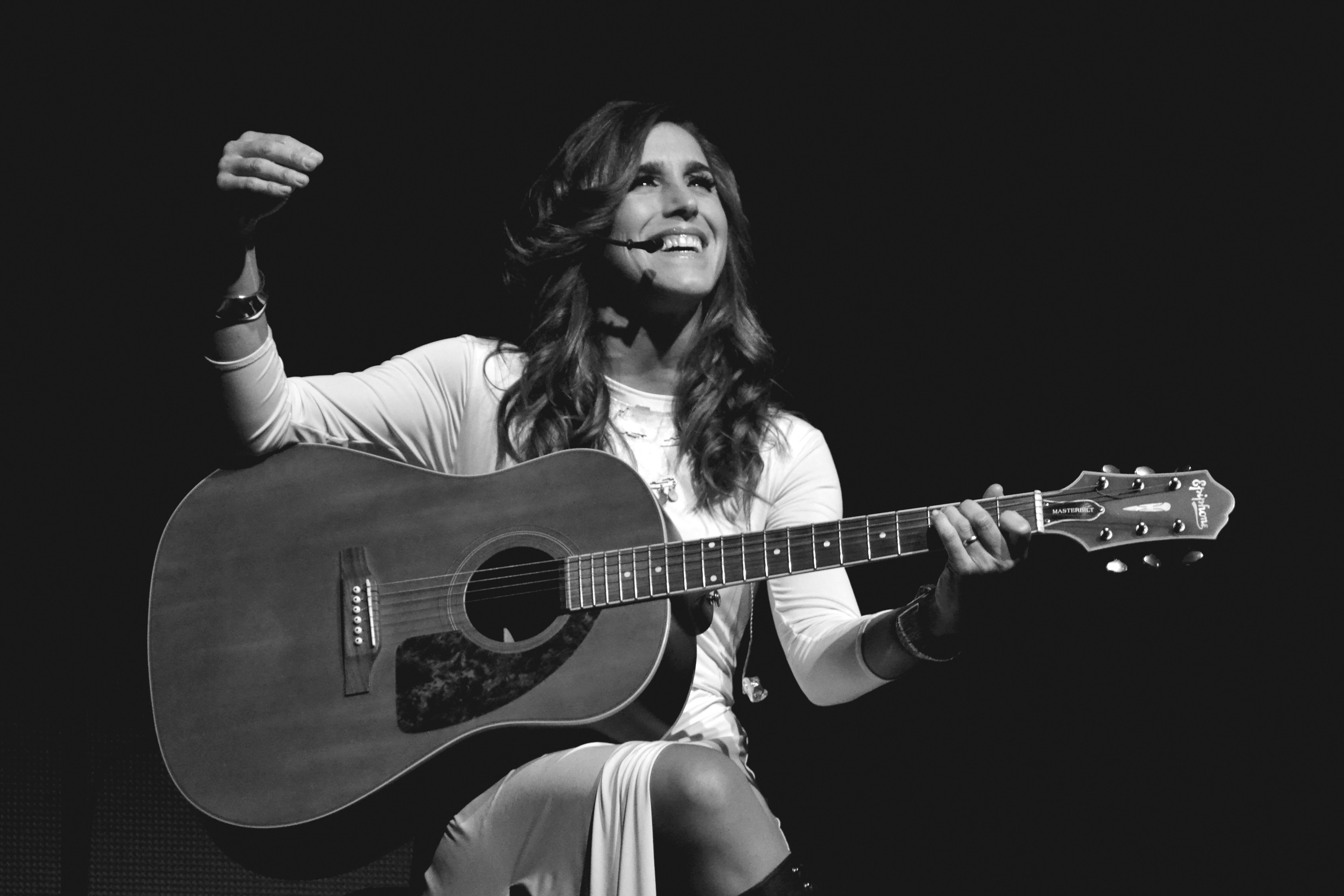 Soledad Pastorutti en vivo en el Teatro Opera. Gira "Vivir es hoy".